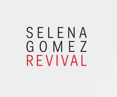 Cover art del álbum de 2015